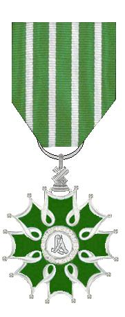 Eigen tekening